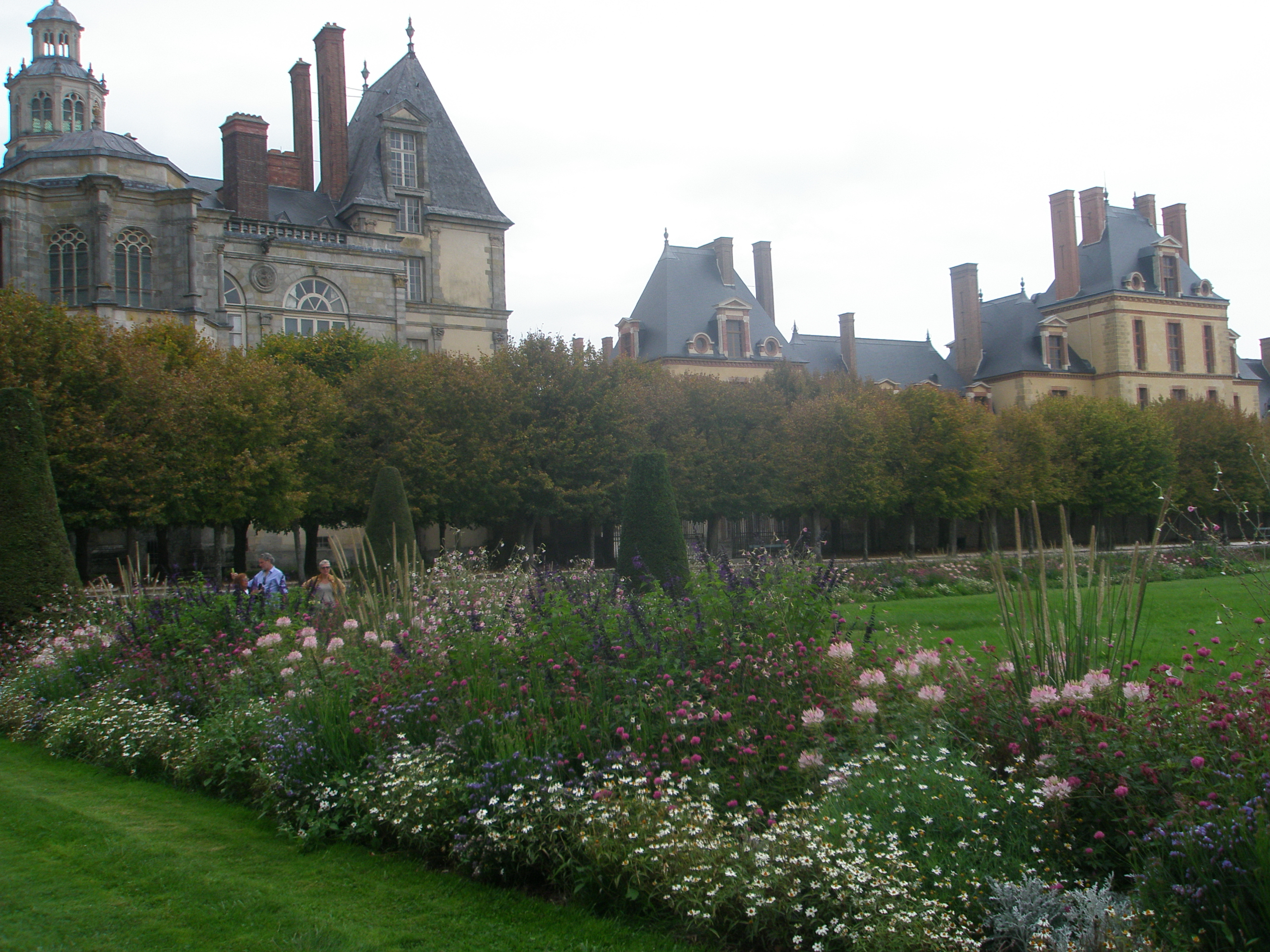 Дворец Фонтенбло и парк